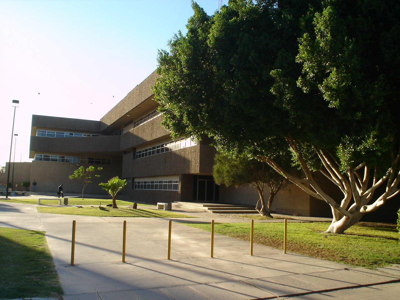 Vicerectoria uabc